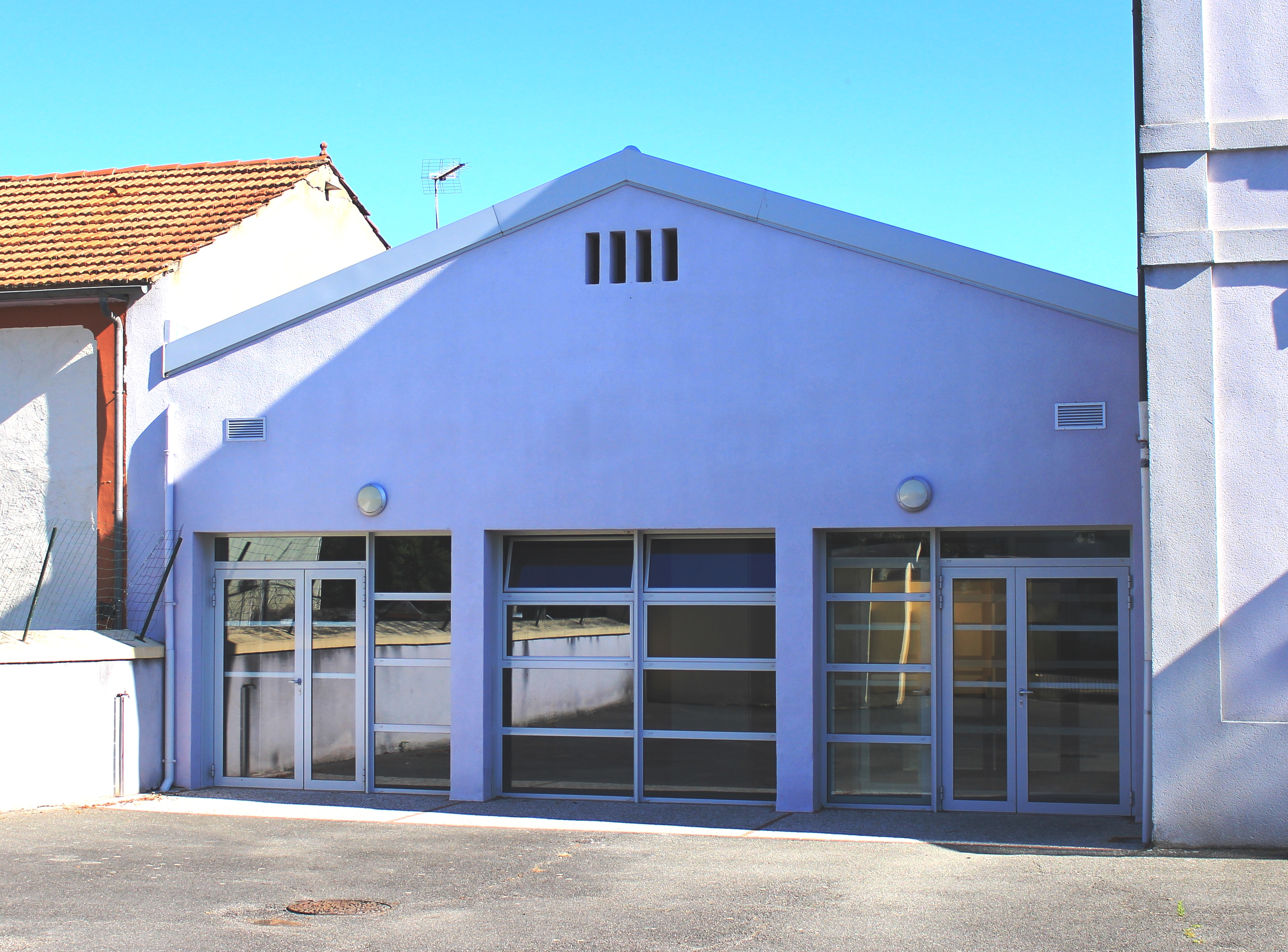 Salle des fêtes de Sarniguet (Hautes-Pyrénées)